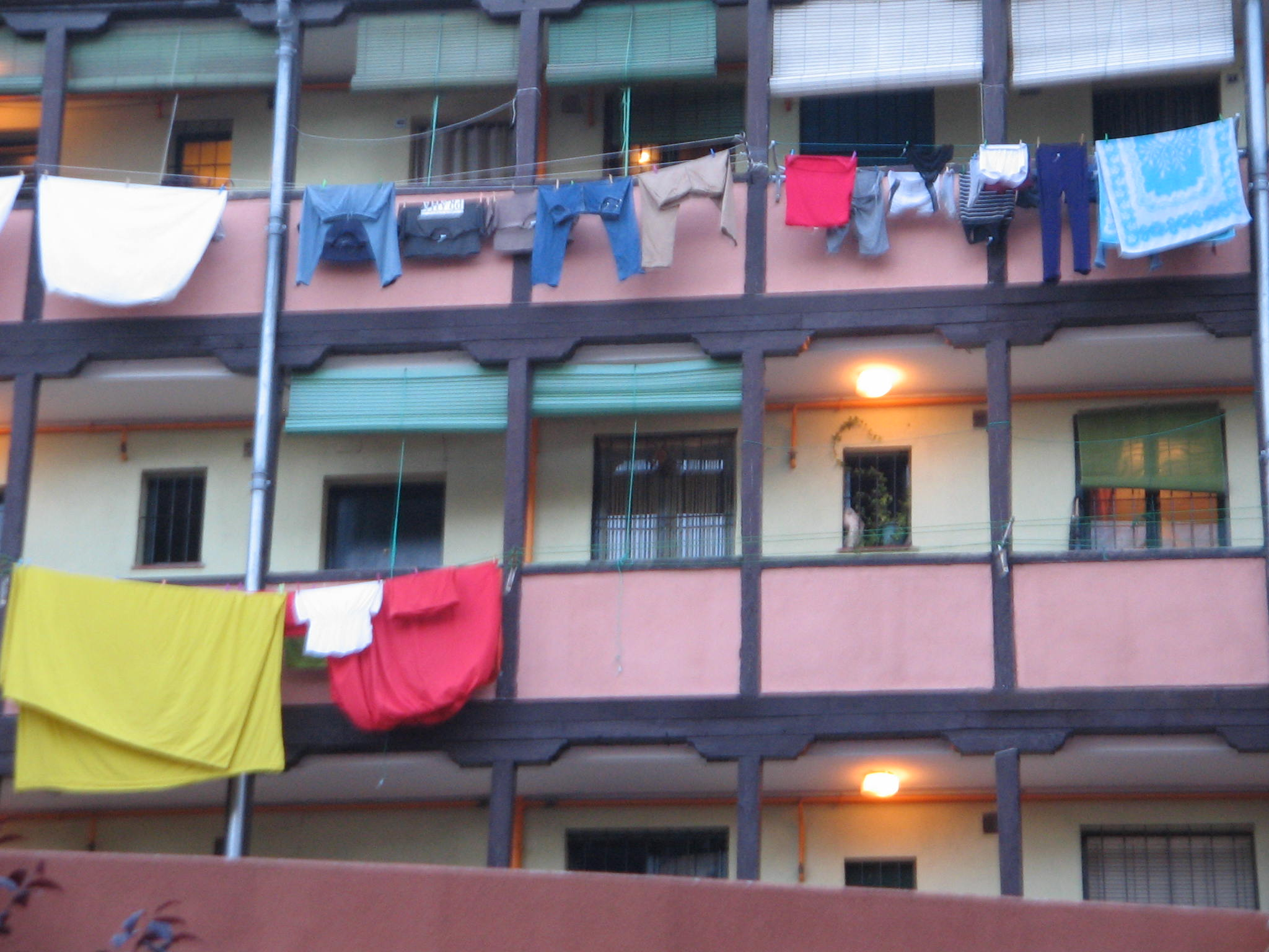 Fachada de corrala en el madrileño barrio de Lavapiés.